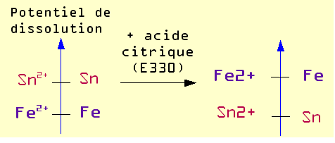 Positions relatives des potentiels de dissolution du fer (Fe) et de l'étain.